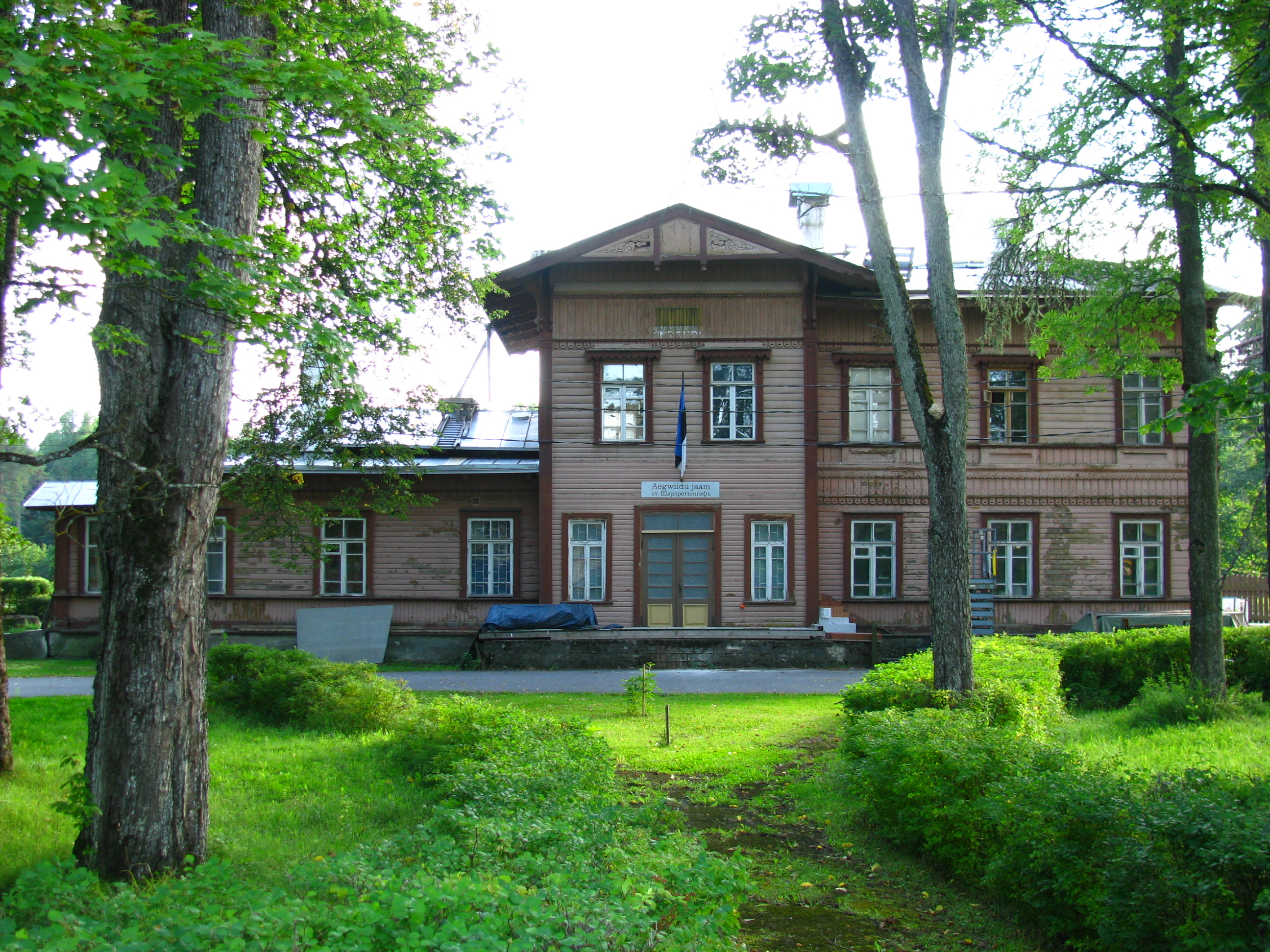 Aegviidu jaama peahoone